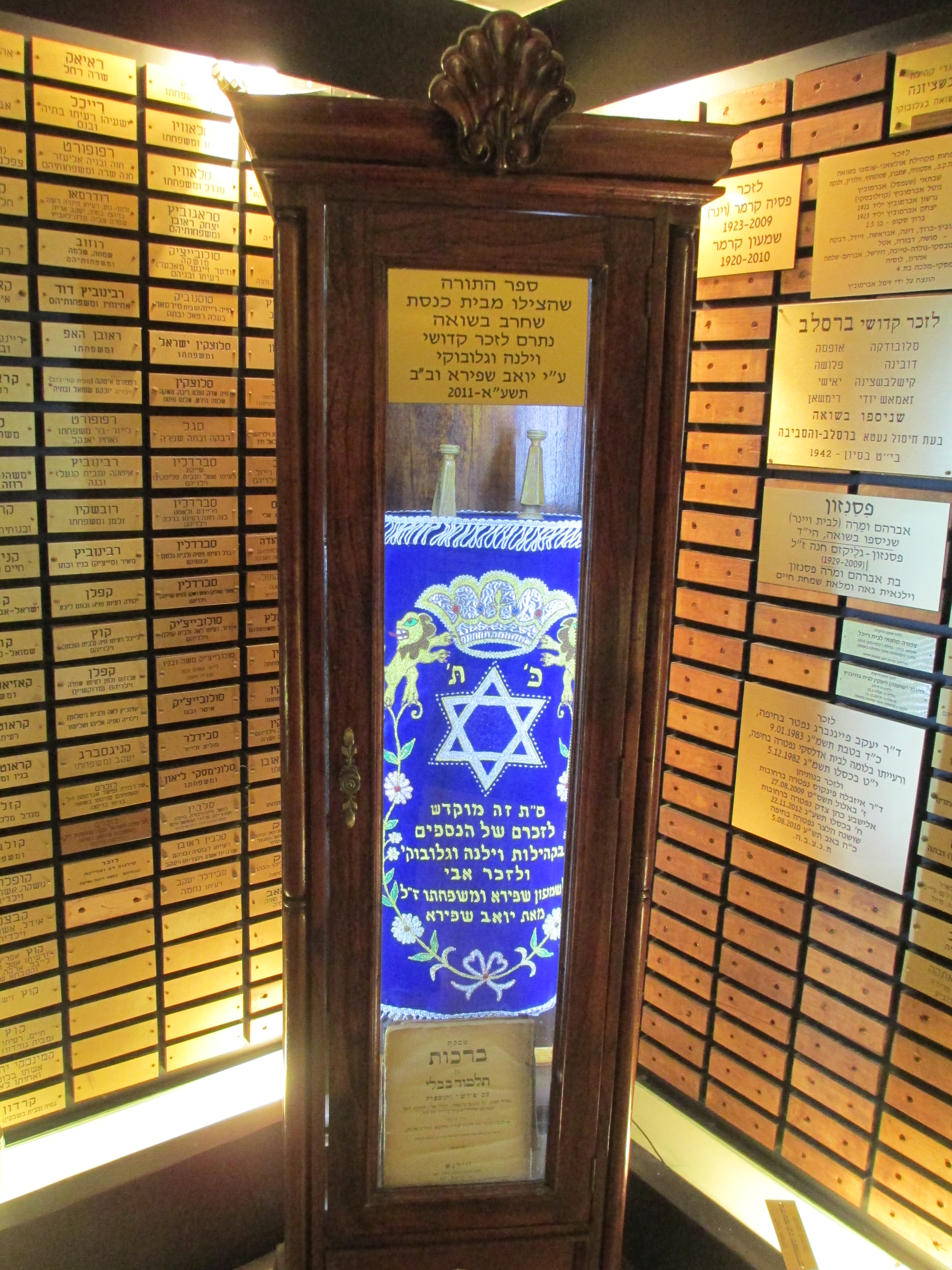 ספר תורה לזכר יהודי וילנה וגלובוקי בבית וילנה בשכונת מונטיפיורי